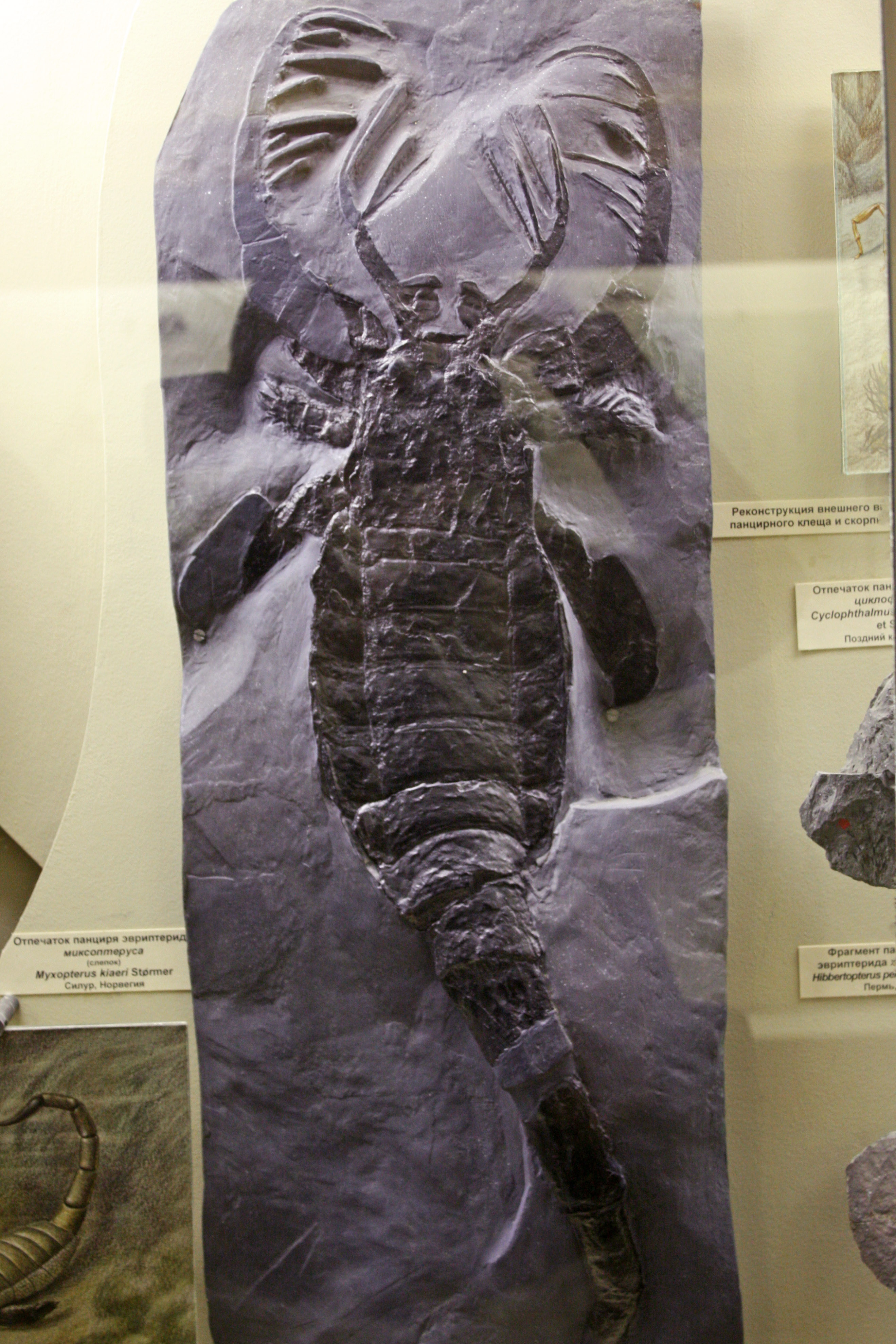 Mixopterus kiaeri specimen